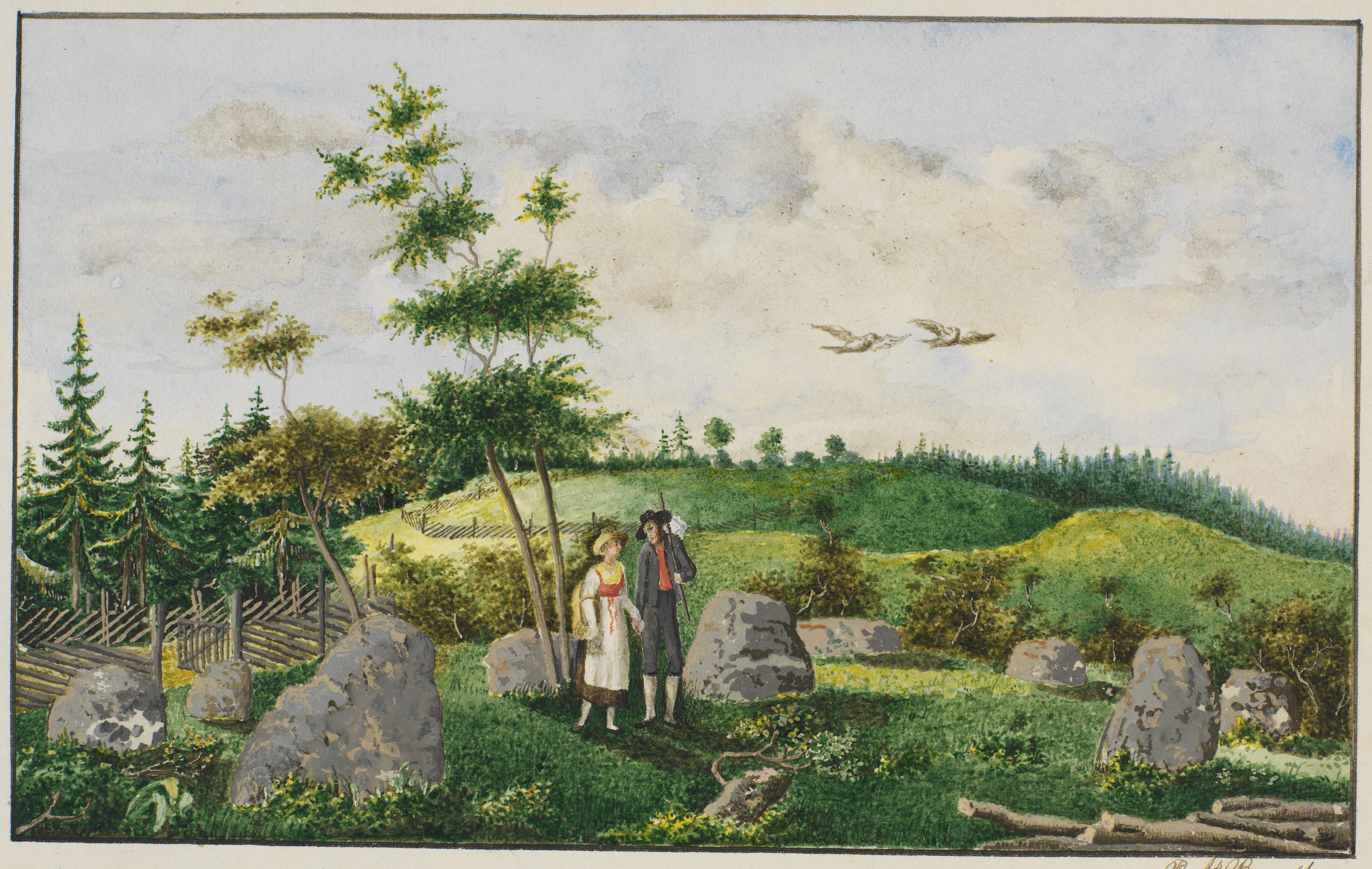 Illustrasjon hentet fra et privatarkiv i Nasjonalbiblioteket med tittelen "Thingstene paa Bilden i Hadeland" av Peter Andreas Brandt.